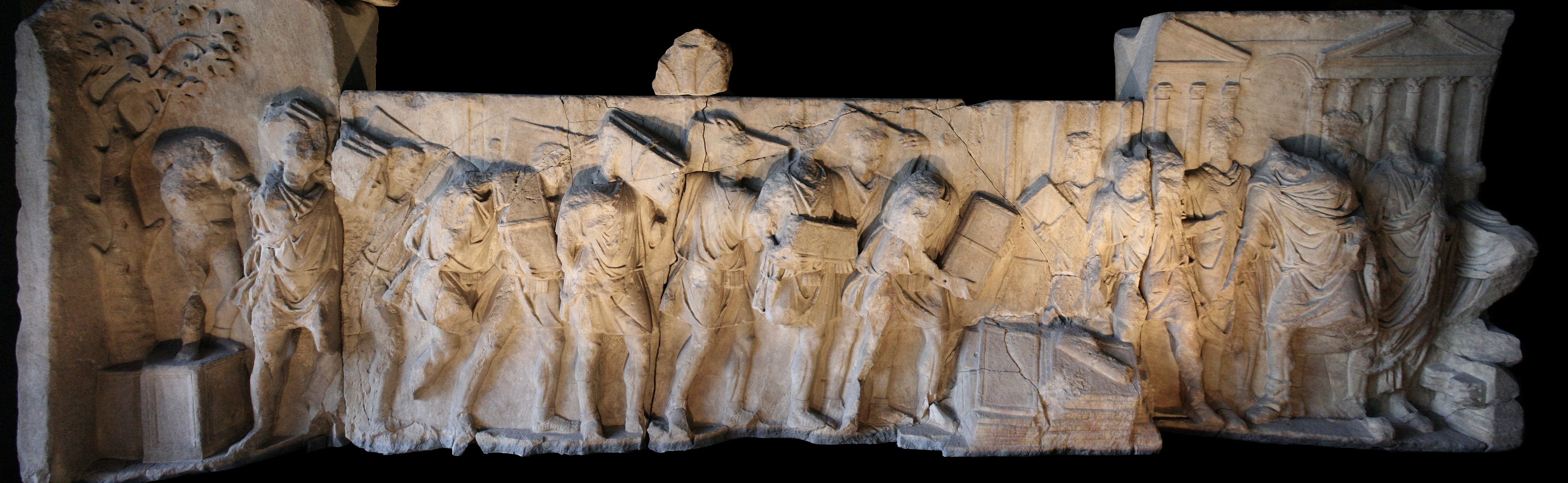 Fragment des Plutei Traiani : Les documents enregistrant la perception des taxes sont brûlés à l'occasion de l'effacement des dettes.